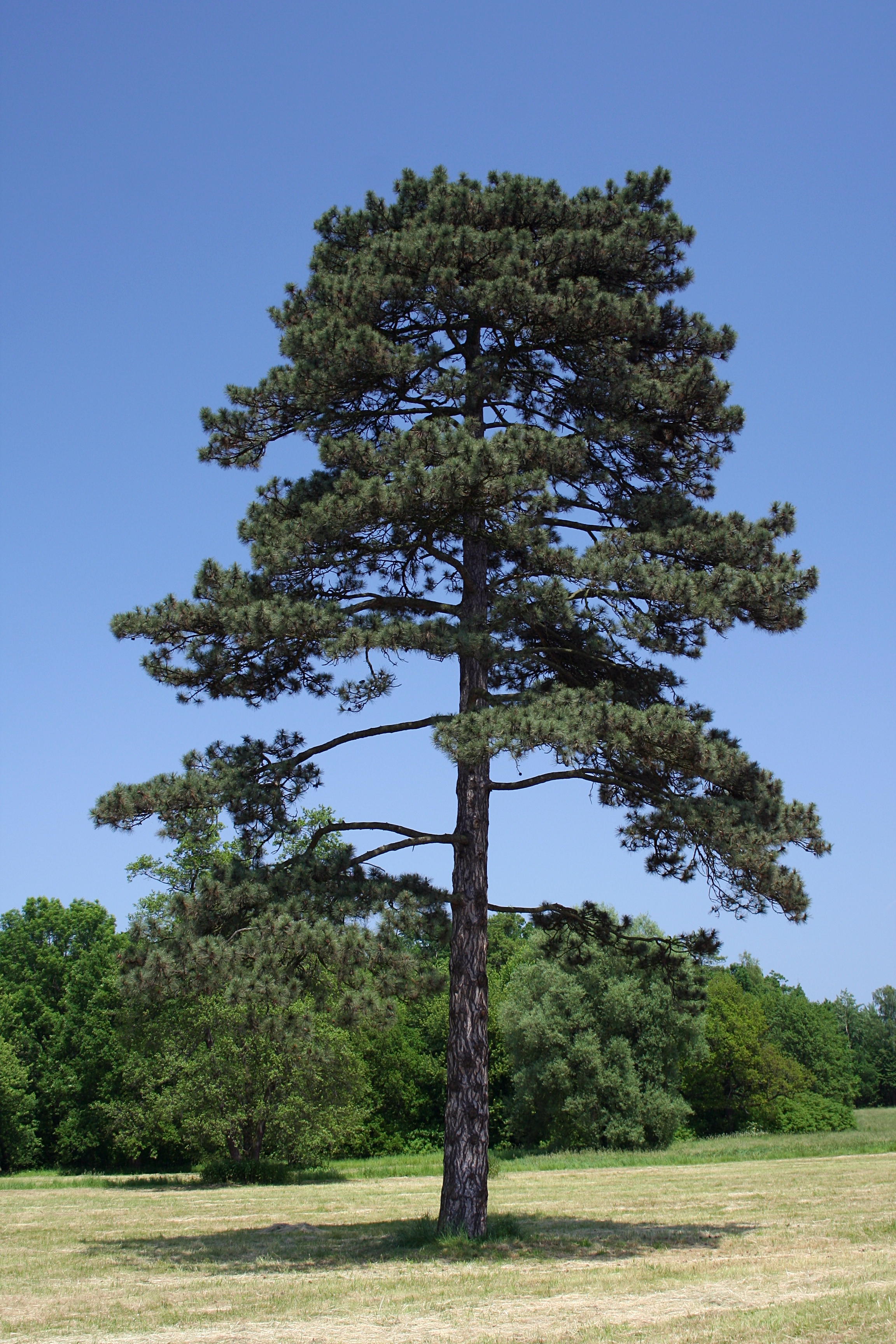 Sosna czarna w parku w Świerklańcu